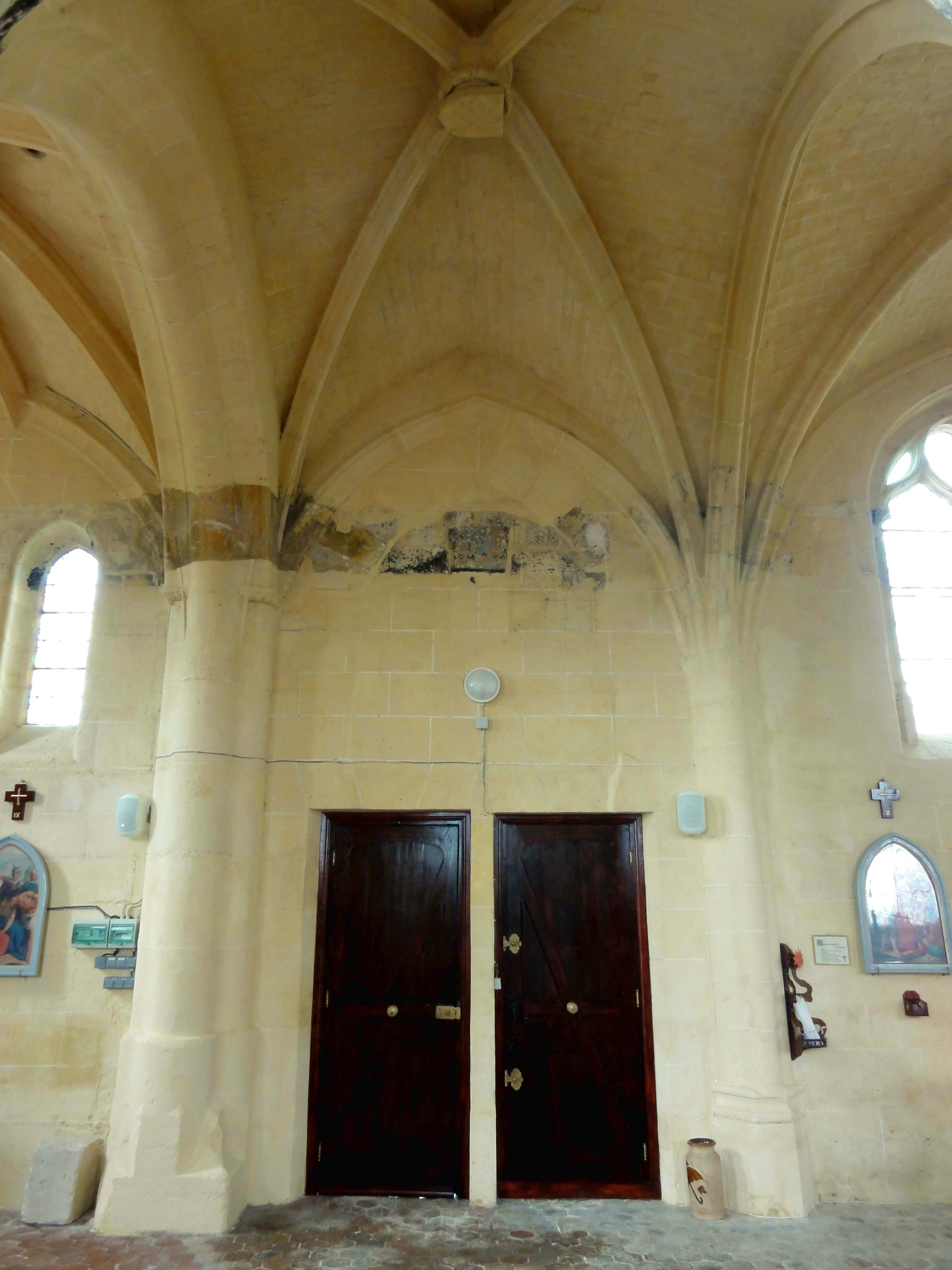 Intérieur de l'église - voir titre.